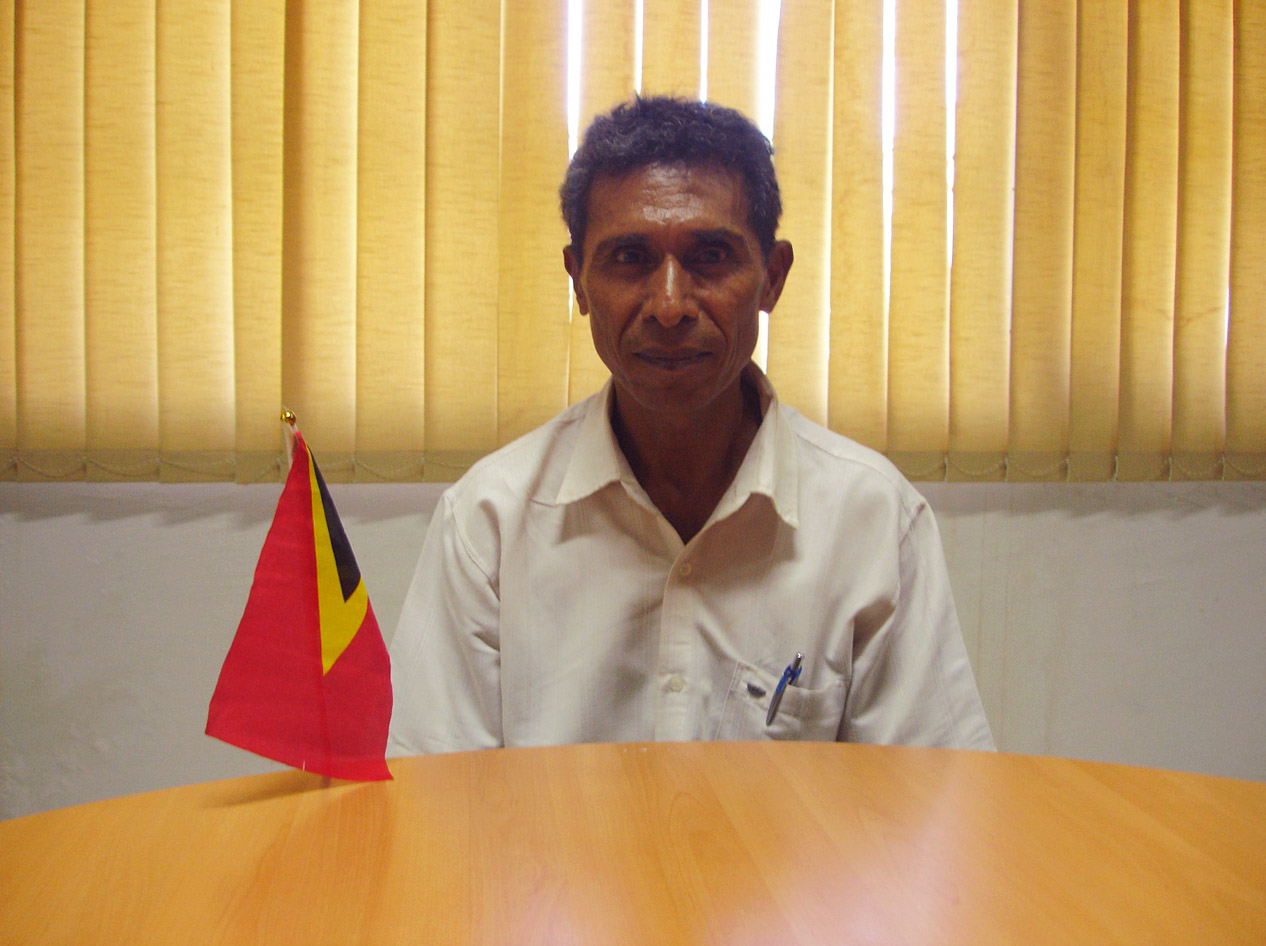 Mario F. Sarmento Cabral, Administrator des Subdistrikts Laclo